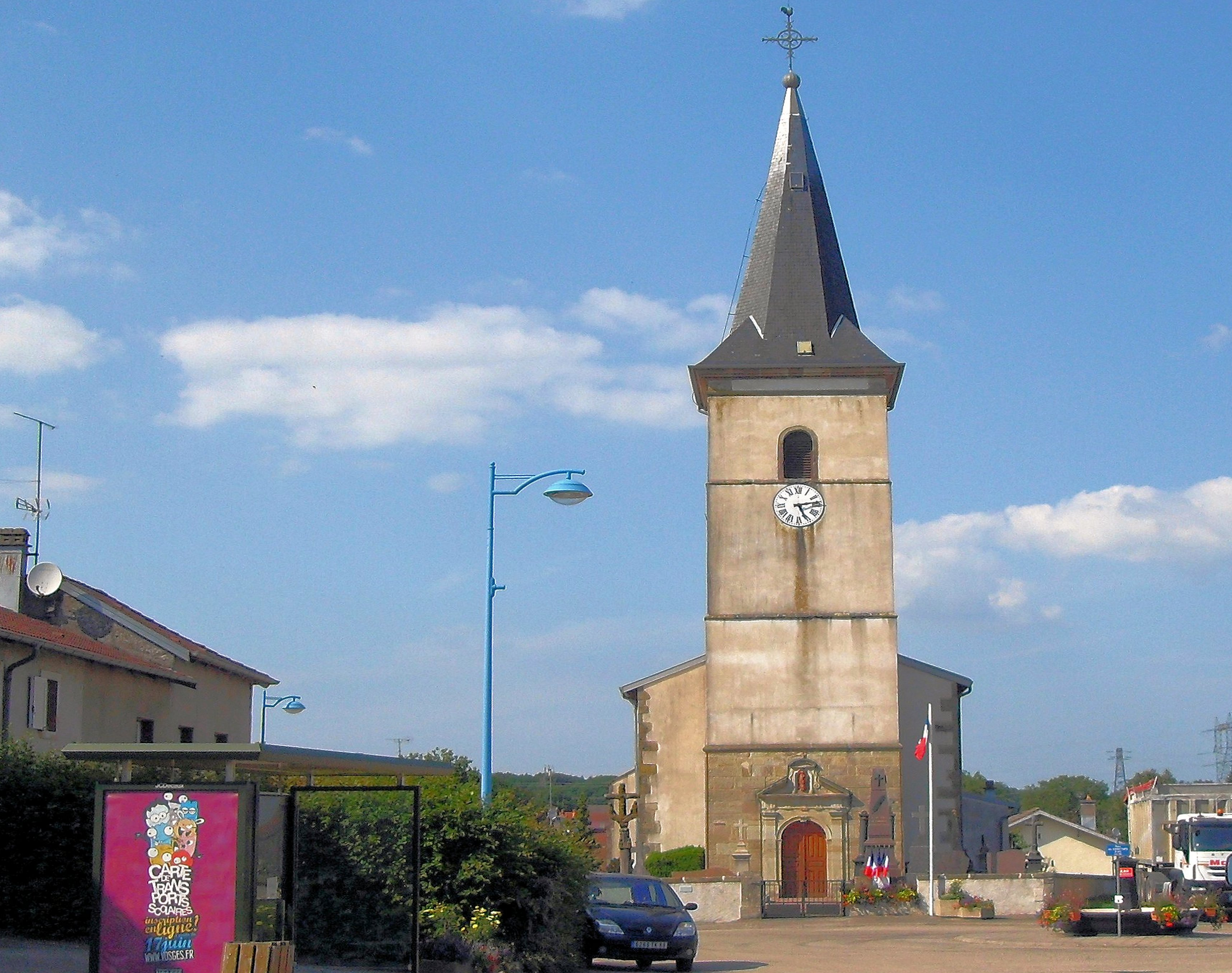 L*église de l'Exaltation de la Sainte-Croix de Sercœur